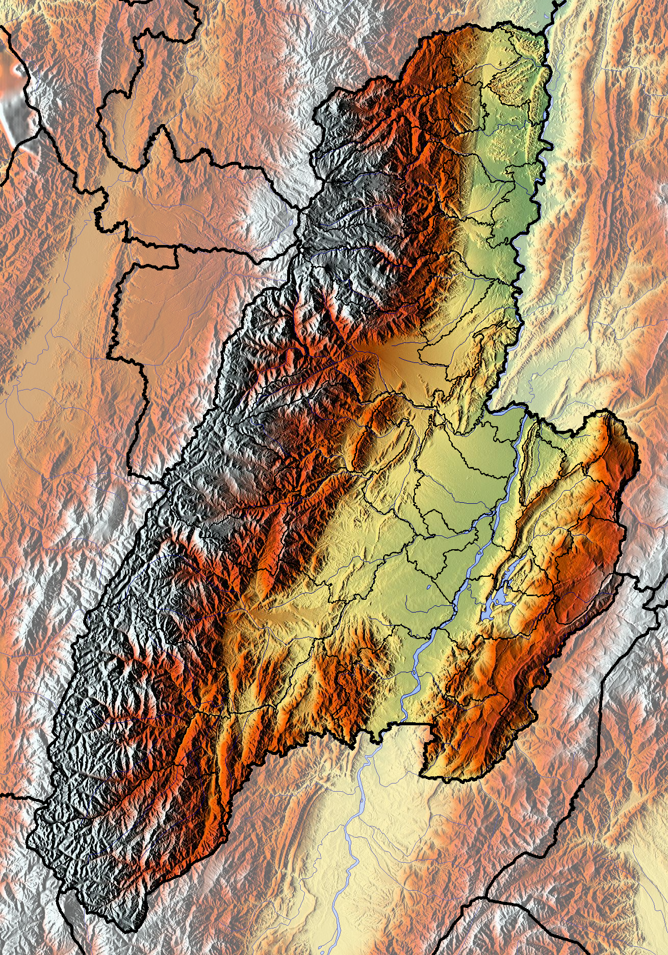 Tolima dept